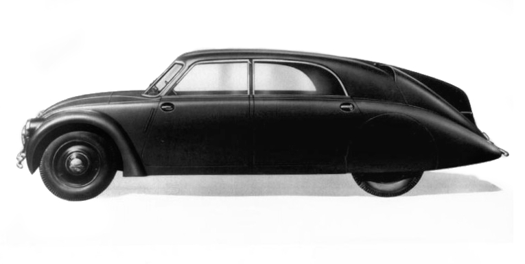 Tatra 77, Photo: archive Tatra Kopřivnice